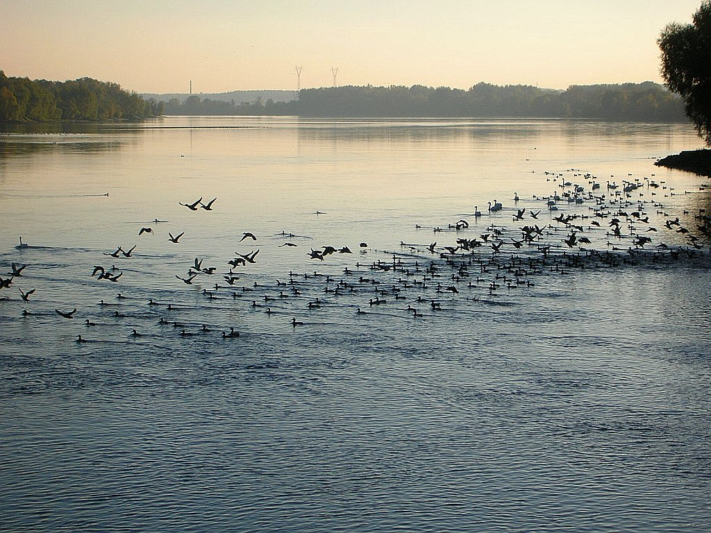 Stada ptaków na Wiśle w Brdyujściu w Bydgoszczy